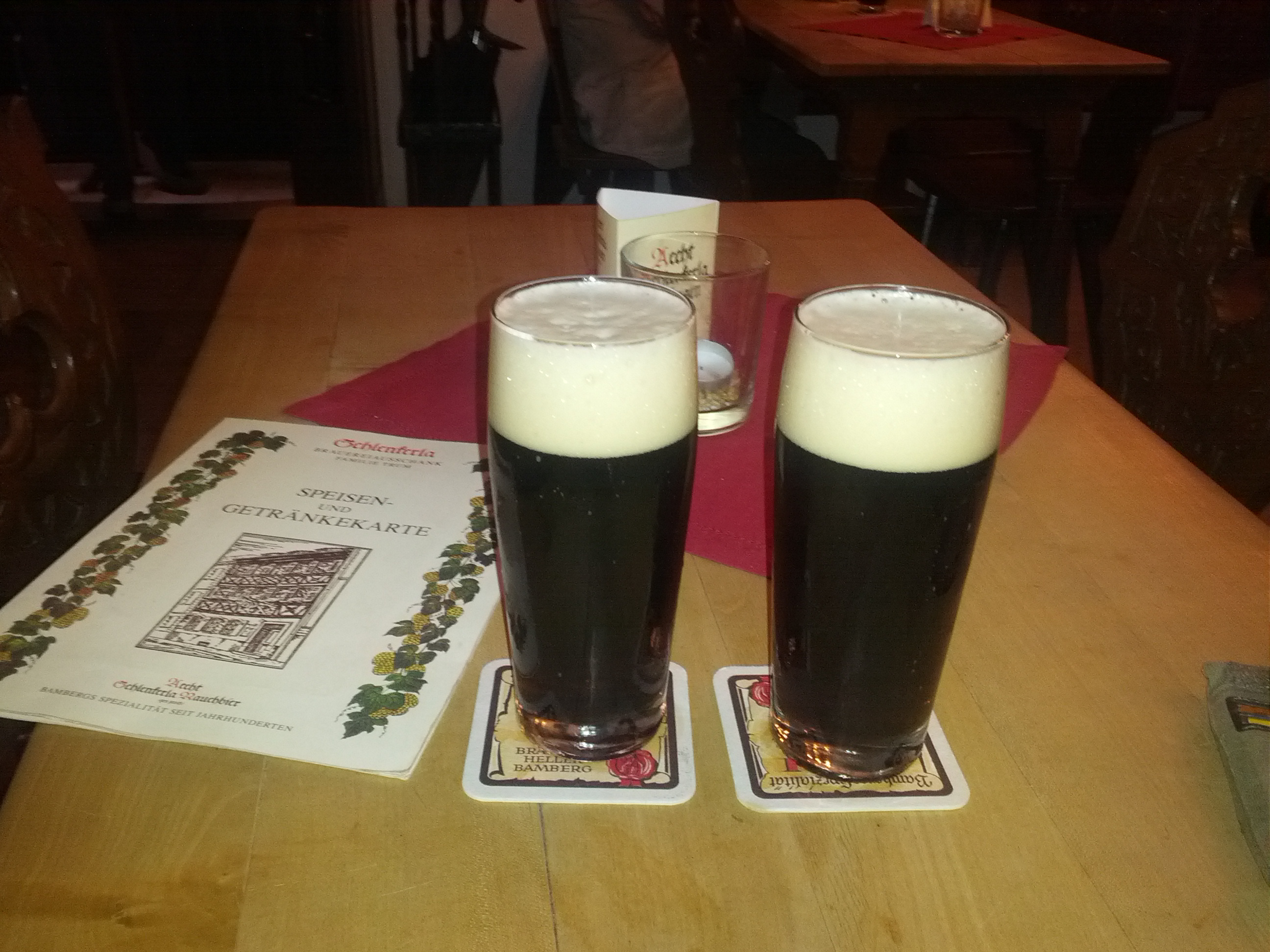 Bier der Bamberger Brauerei Schlenkerla